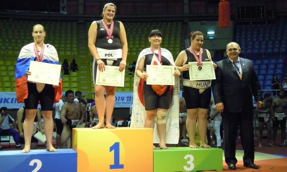 Dekoracja MŚ junior Tajwan 2014